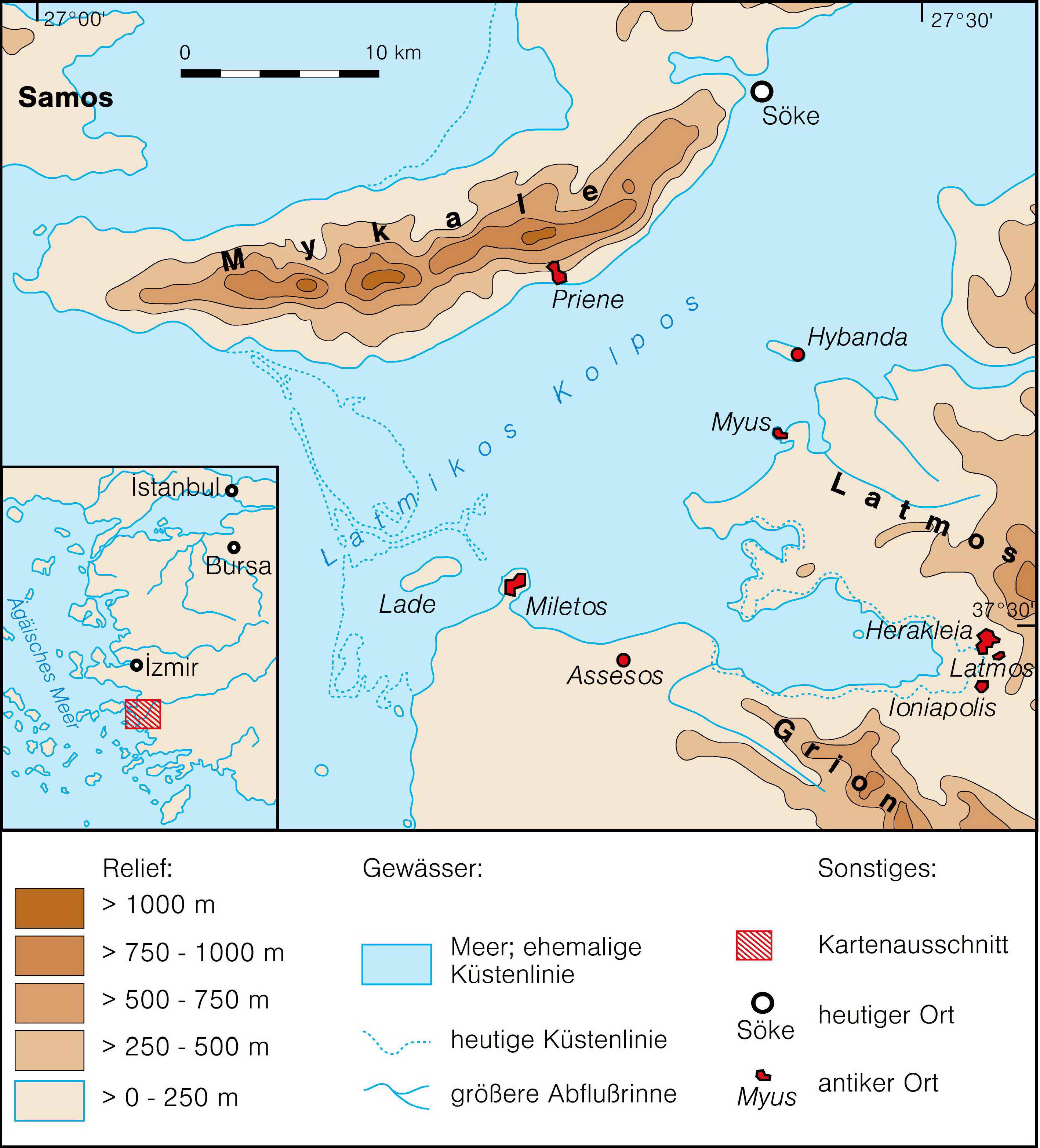 Nach dem Ausklingen der letzten Kaltzeit hatte die Klimaerwärmung zum Anstieg des Meeresspiegels geführt. Während der „flandrischen Transgression“ wurden Teile der kontinentalen Schelfgebiete und Küsten Kleinasiens um bis zu 130 m hoch überflutet - so auch der westliche Teil des Menderes-Grabens. Das Meer reichte damals ca. 60 km landeinwärts etwa bis zur heutigen Provinzhauptstadt Aydın: Der Latmische Golf (Latmikos Kolpos) war entstanden.